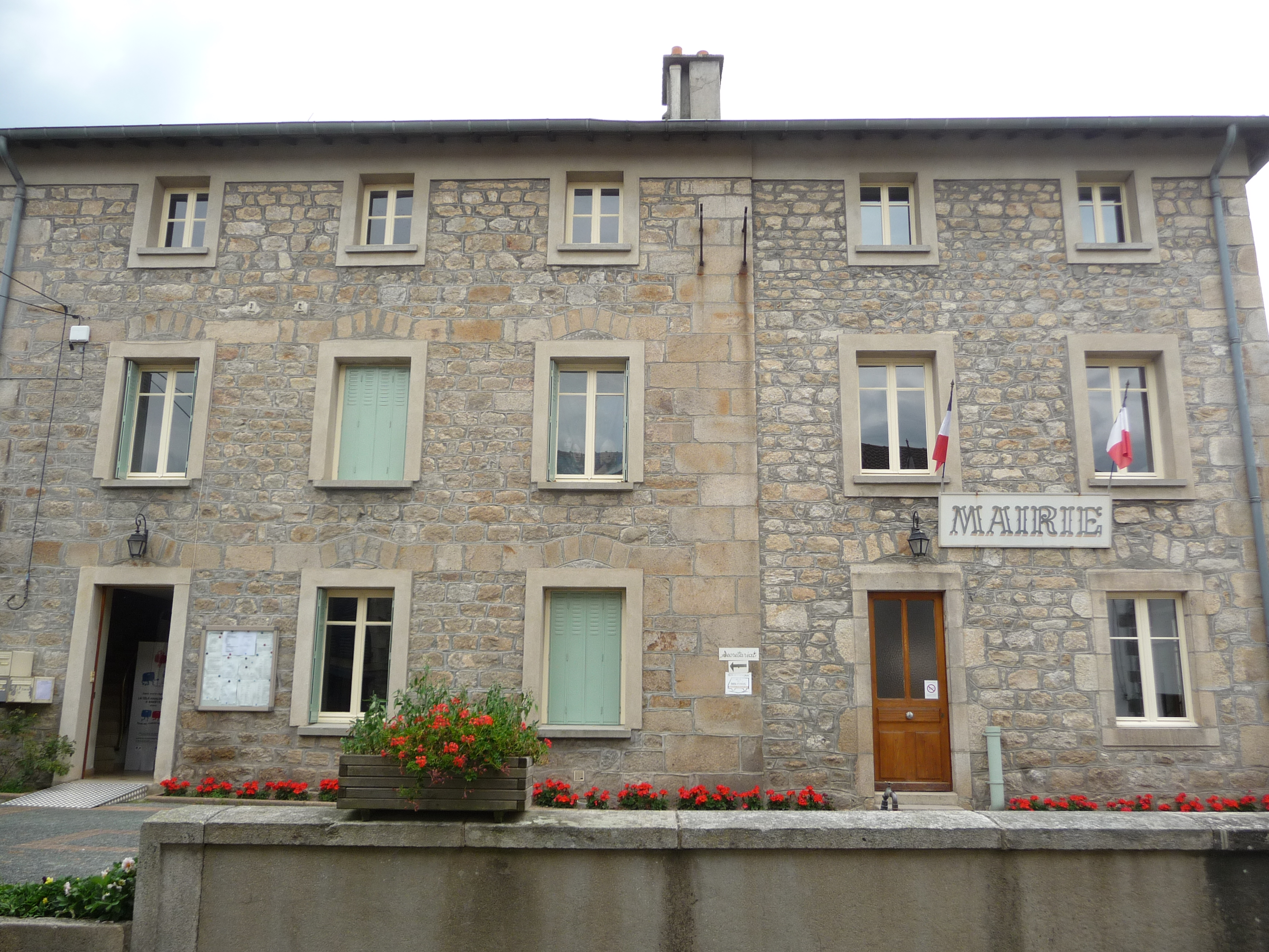 Mairie de Job.